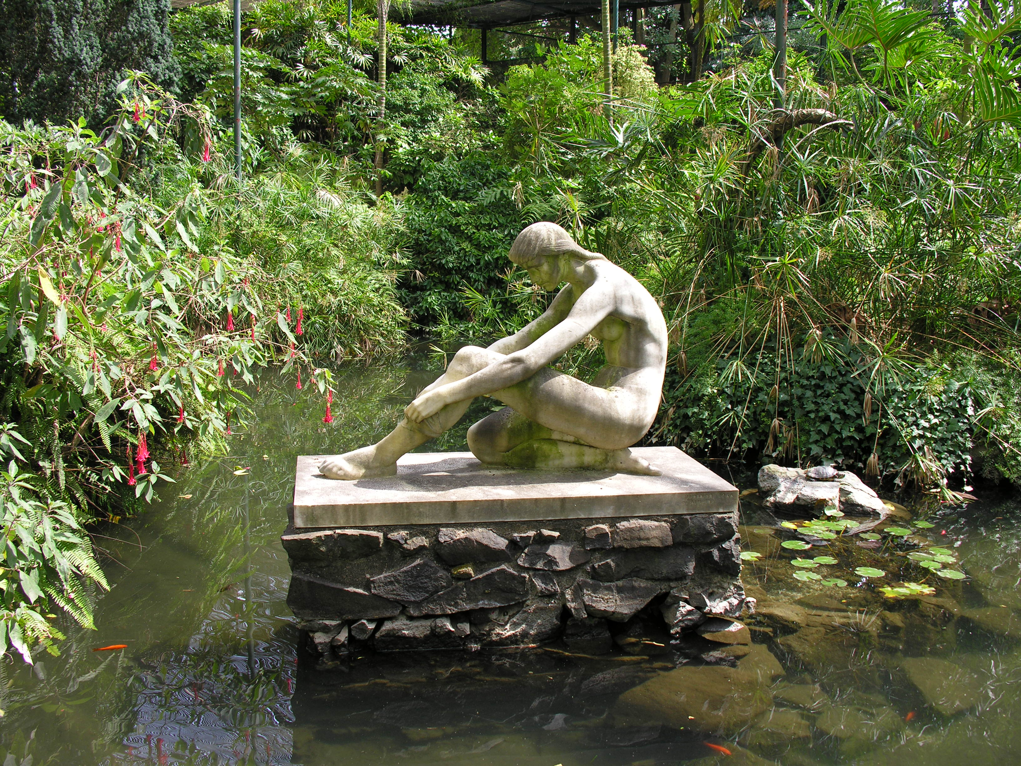 Estufa Fria, lisboa